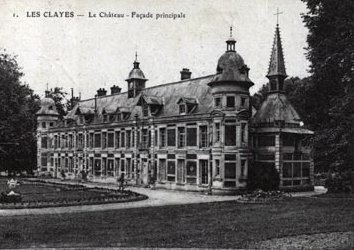 Les Clayes-sous-Bois (Yvelines - France) Vue de la façade principale du château